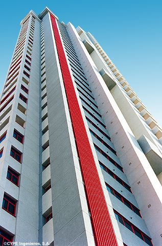 Torre Soinsa trasera